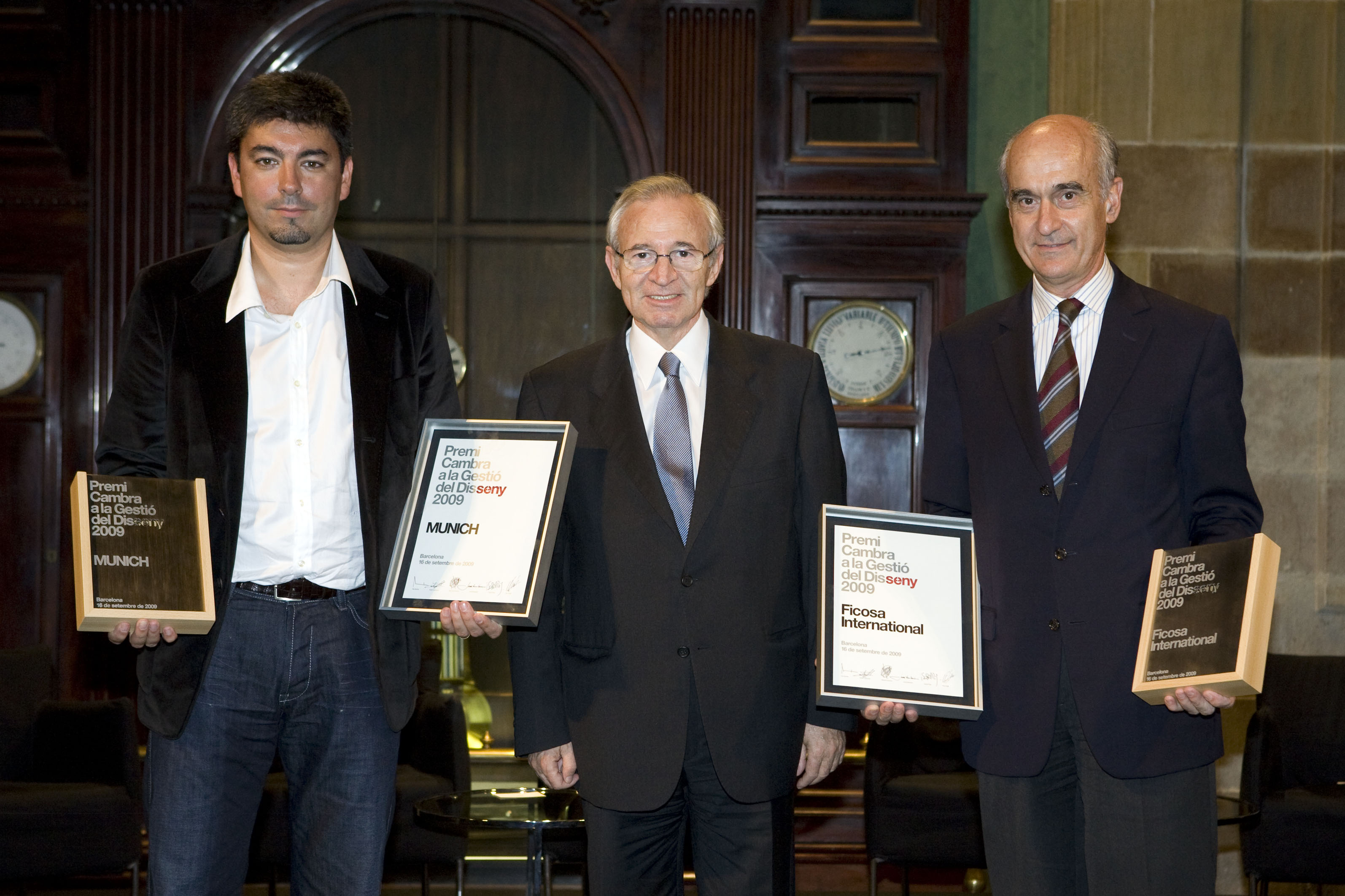 Les empreses FICOSA i MUNICH van ser guardonades ex aequo amb el Premi Cambra a la Gestió del Disseny 2009. El guardó el va lliurar el President de la Cambra de Comerç i de BCD, Miquel Valls. A l'esquerra, Xavier Berneda de Munich, al centre, Miquel Valls, i a la dreta, Vicenç Aguilera, de Ficosa.